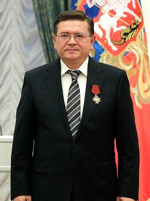 Петр Шаболтай – художественный руководитель Государственного Кремлевского Дворца